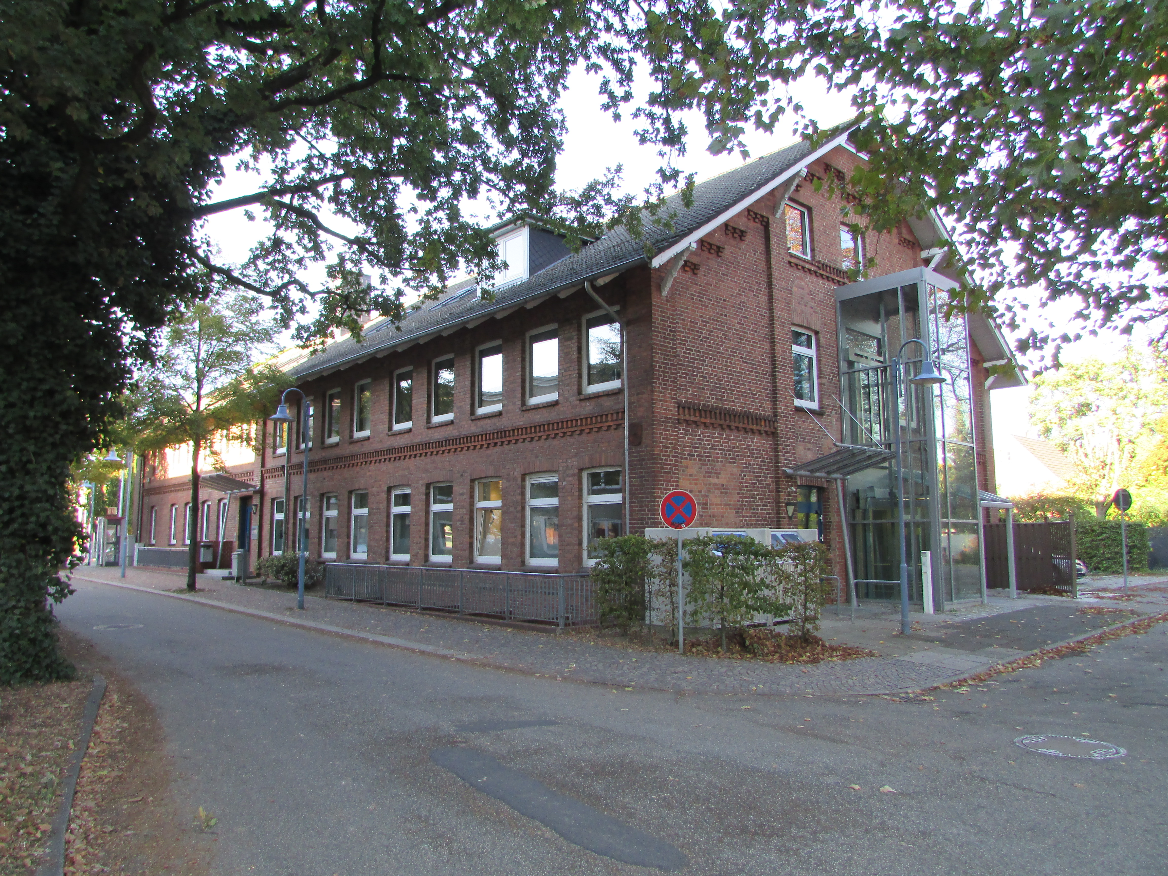 Gebäude des ehemaligen Amtsgerichts Geesthacht im Bandrieterweg 1. Derzeit wird das Gebäude vom Jobcenter Herzogtum Lauenburg genutzt.